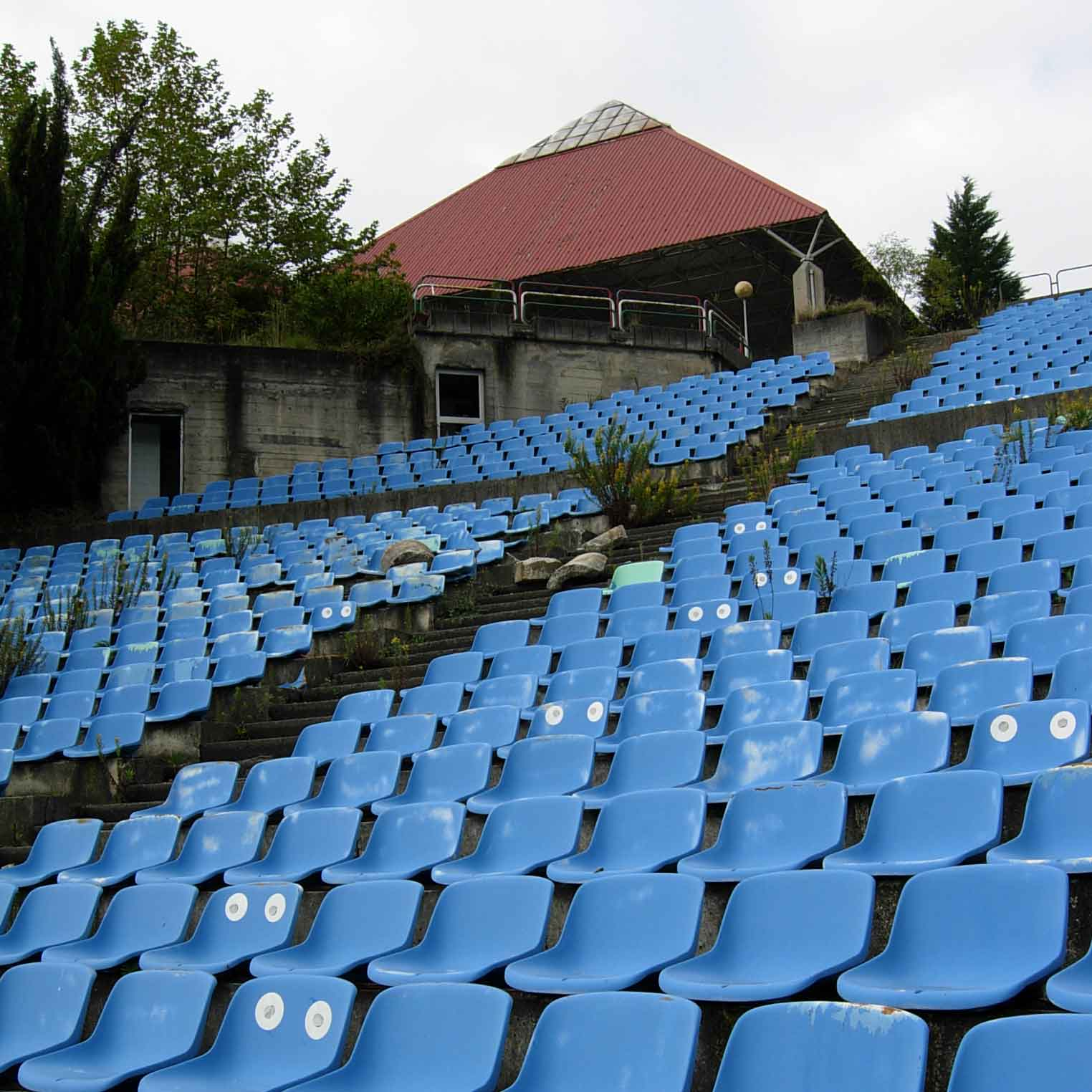 Anfiteatro Auditorio y Pirámide del Parque de Atracciones de Vizcaya